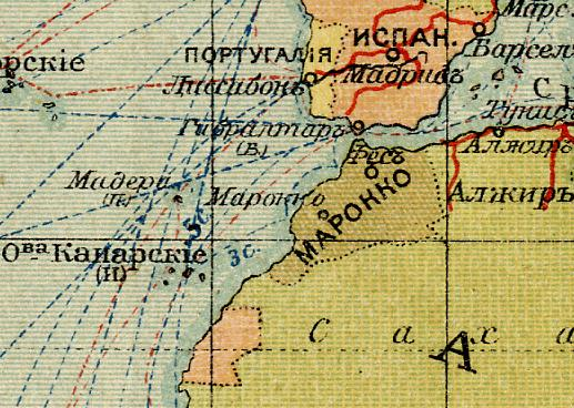 Марокко на карте Африки (1908)